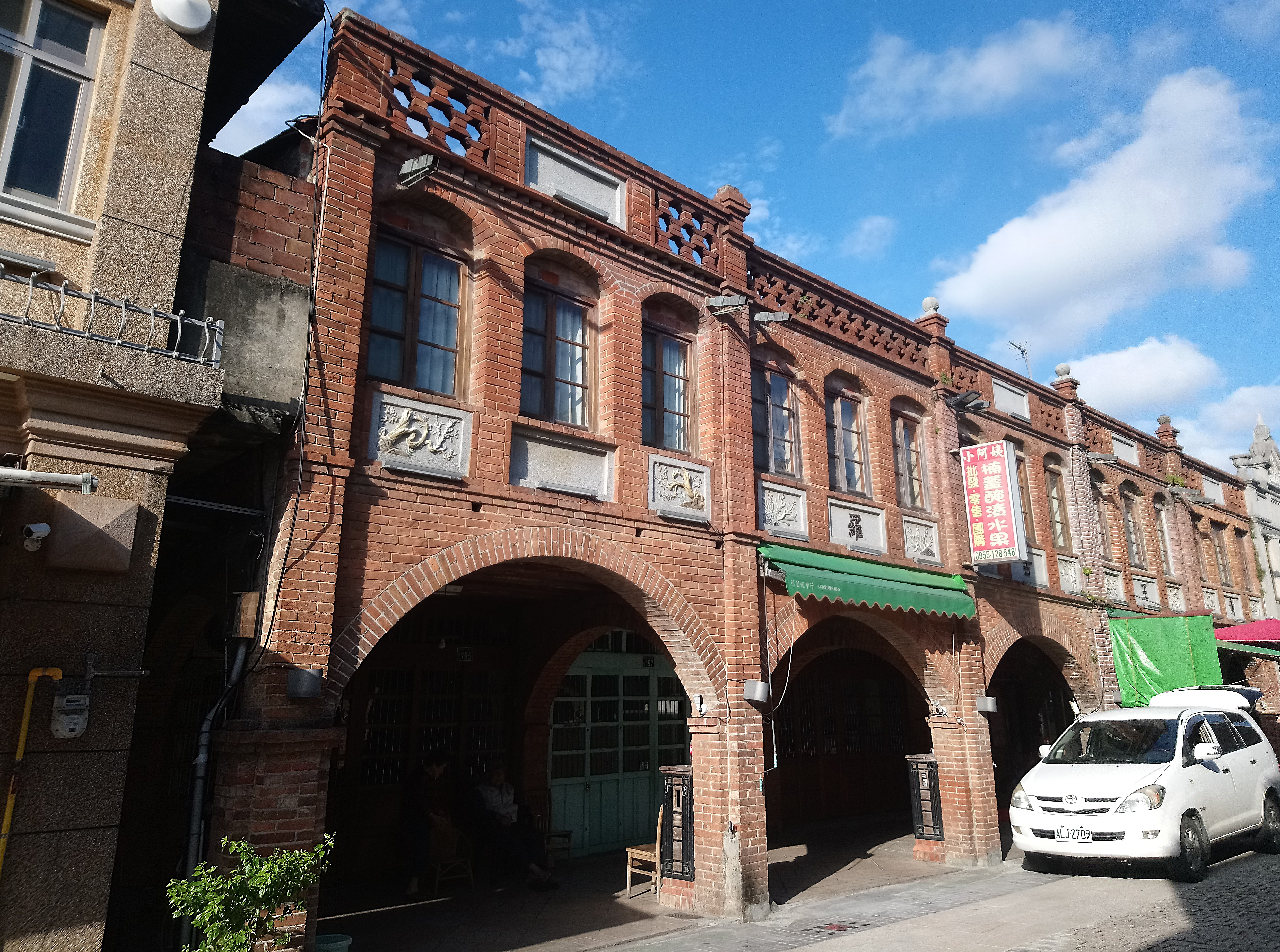 湖口老街,新竹縣湖口鄉湖鏡村